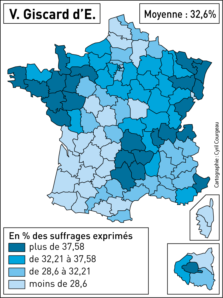 Elections présidentielles en France 1er tour Giscard